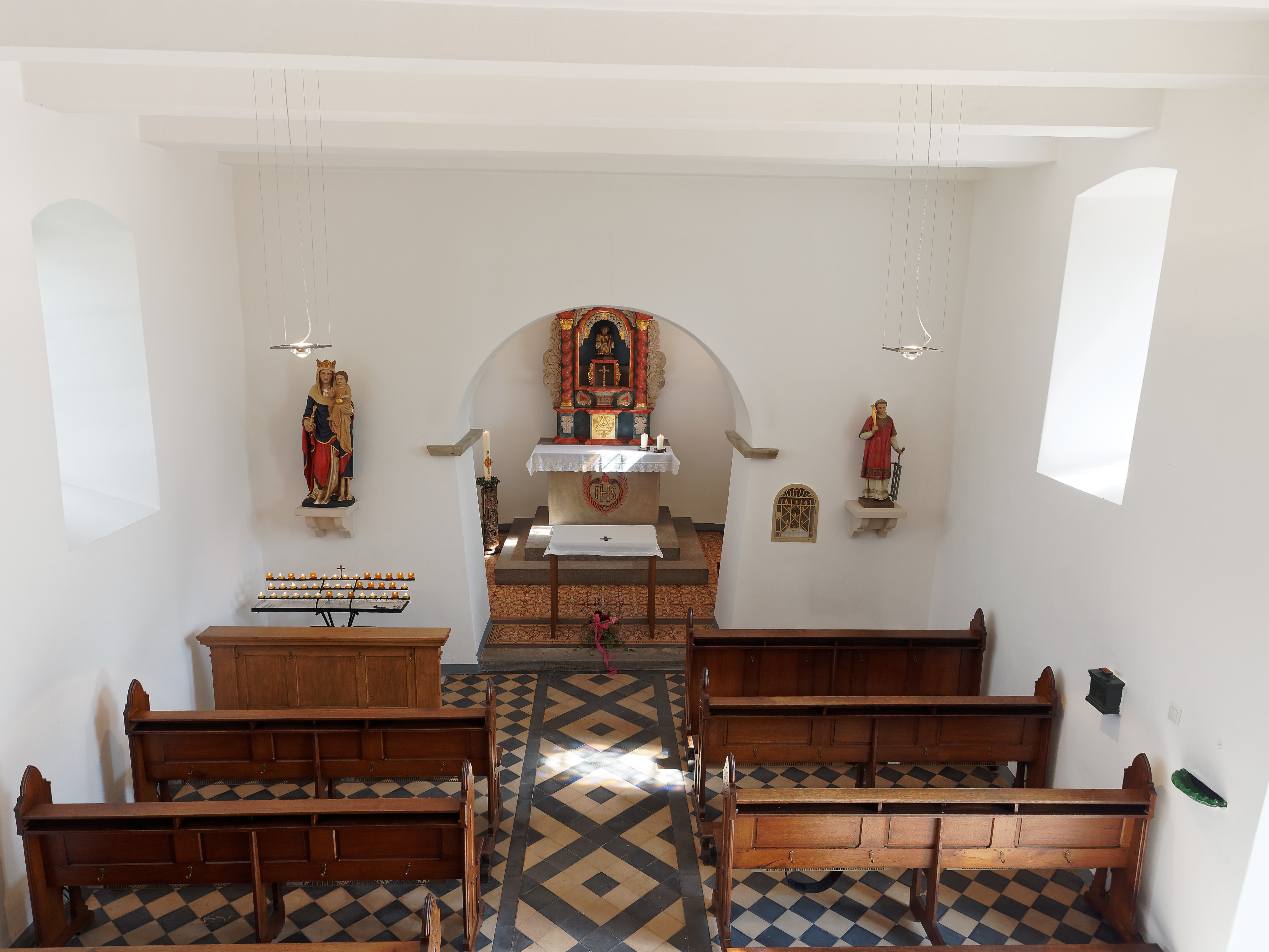 Tag des offenen Denkmals 2017, Kirchenraum in der Kapelle St Laurentius in Waltrop-Leveringhausen, Denkmal aus der Zeit um 1070. Erstmalig 1343 urkundlich erwähnt.